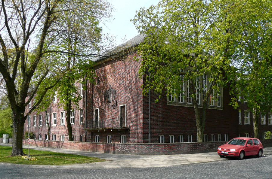 1939 fertiggestelltes, heute denkmalgeschütztes Gebäude der Rinderklinik. Heute befindet sich darin das Physiologische Institut der Tierärztlichen Hochschule Hannover an der Schwesternhausstraße im Stadtteil Bult von Hannover.